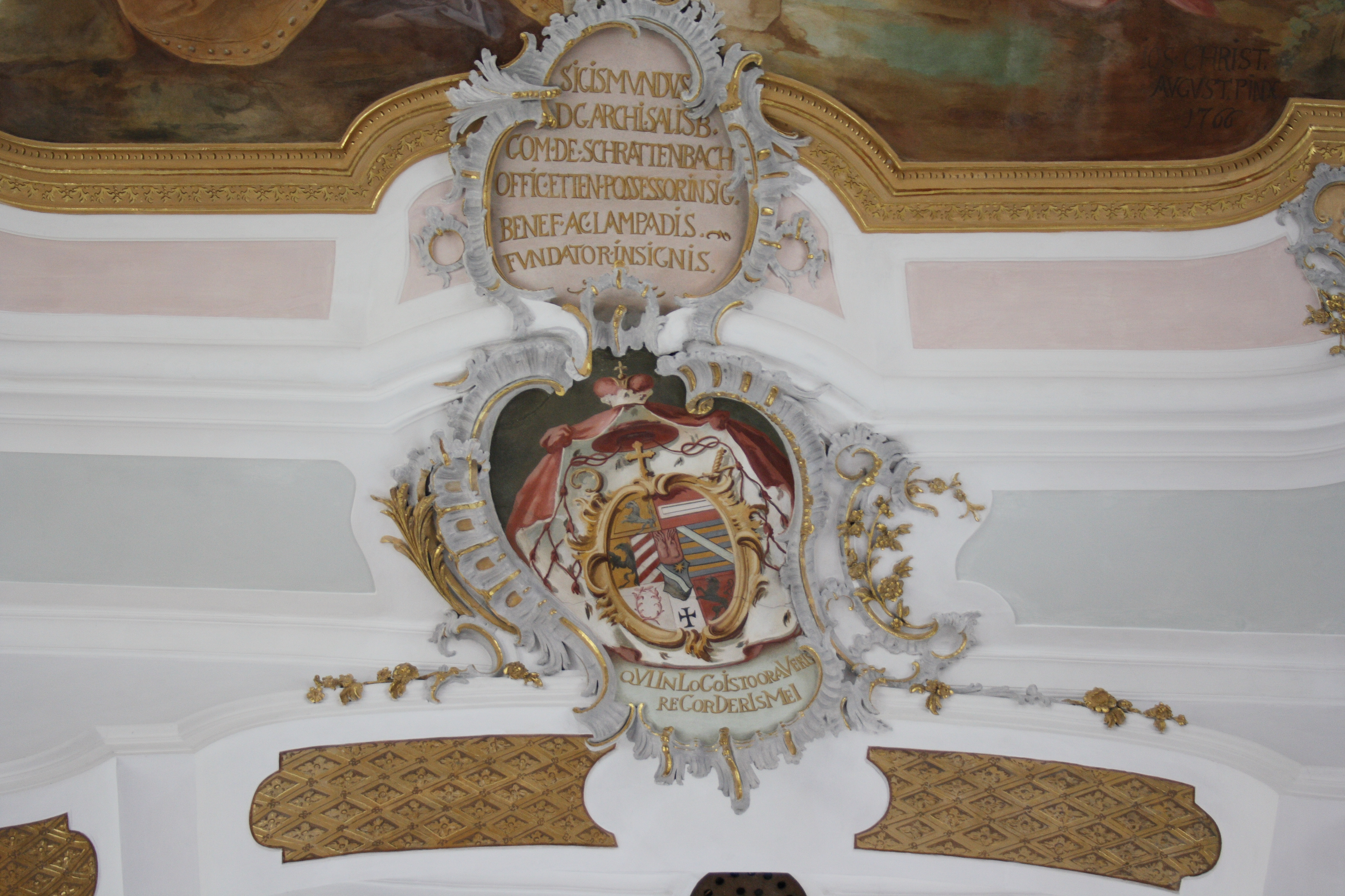 Katholische Pfarrkirche Mariä Himmelfahrt in Ettenbeuren, einem Ortsteil der Gemeinde Kammeltal im Landkreis Günzburg (Bayern), Wappenkartusche über dem Chorbogen von Erzbischof Sigismund Christoph von Salzburg